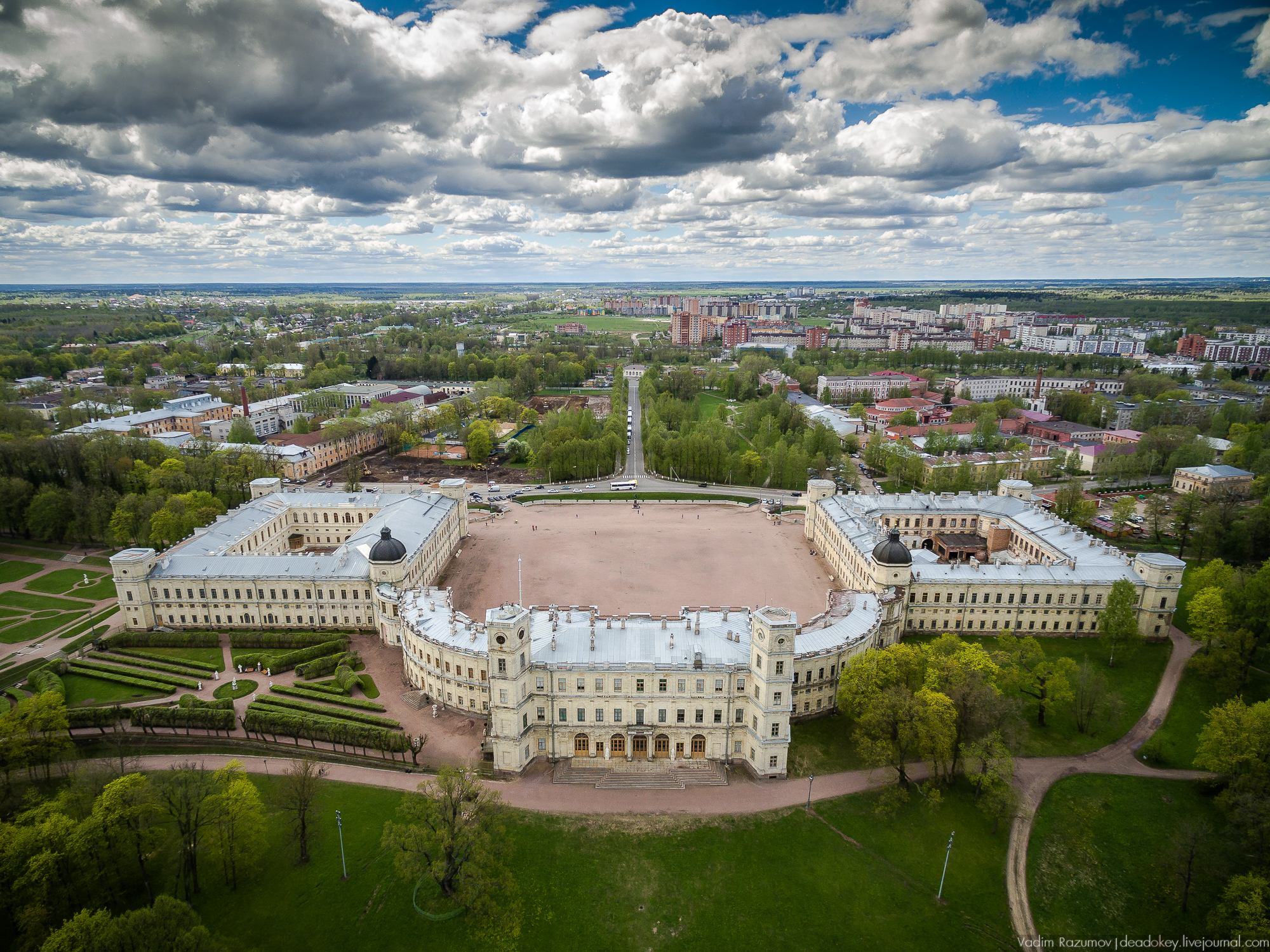 Дворец: Красноармейский проспект, 1, Гатчина, Гатчинский район, Ленинградская область